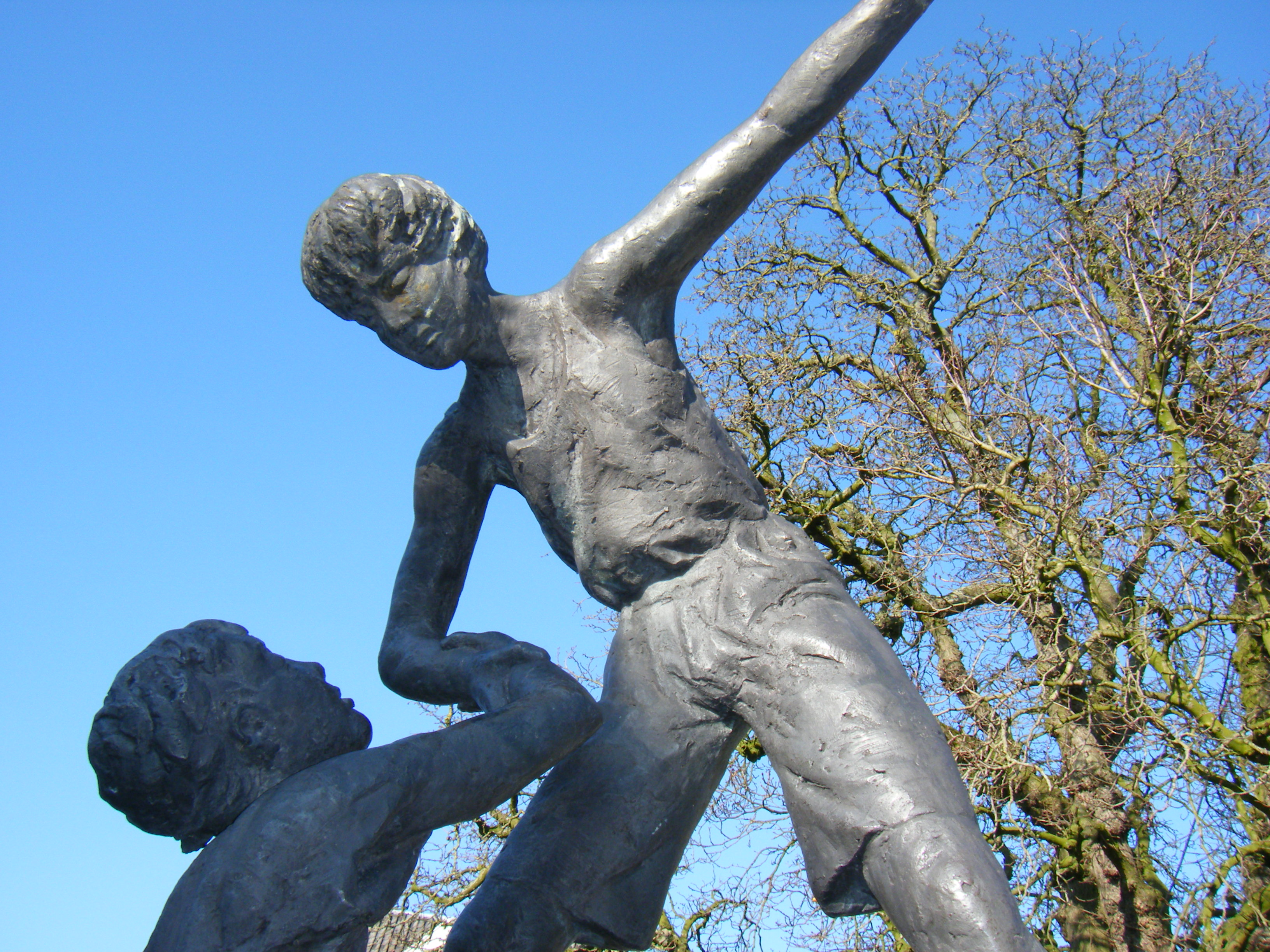 Vredesbeeld De handreiking van Margriet Barends op het Kasteelplein in Montfoort.